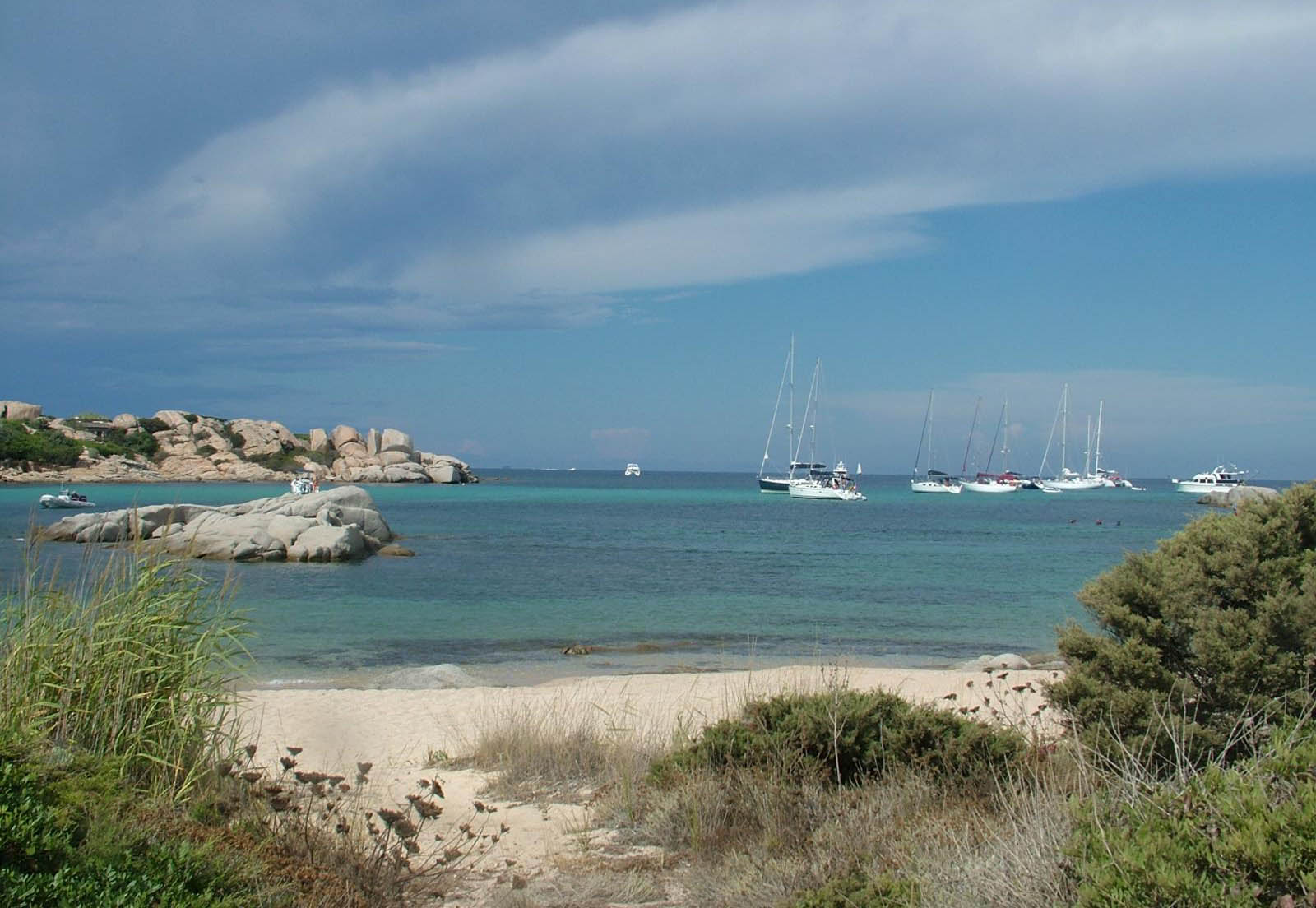 Île Cavallo